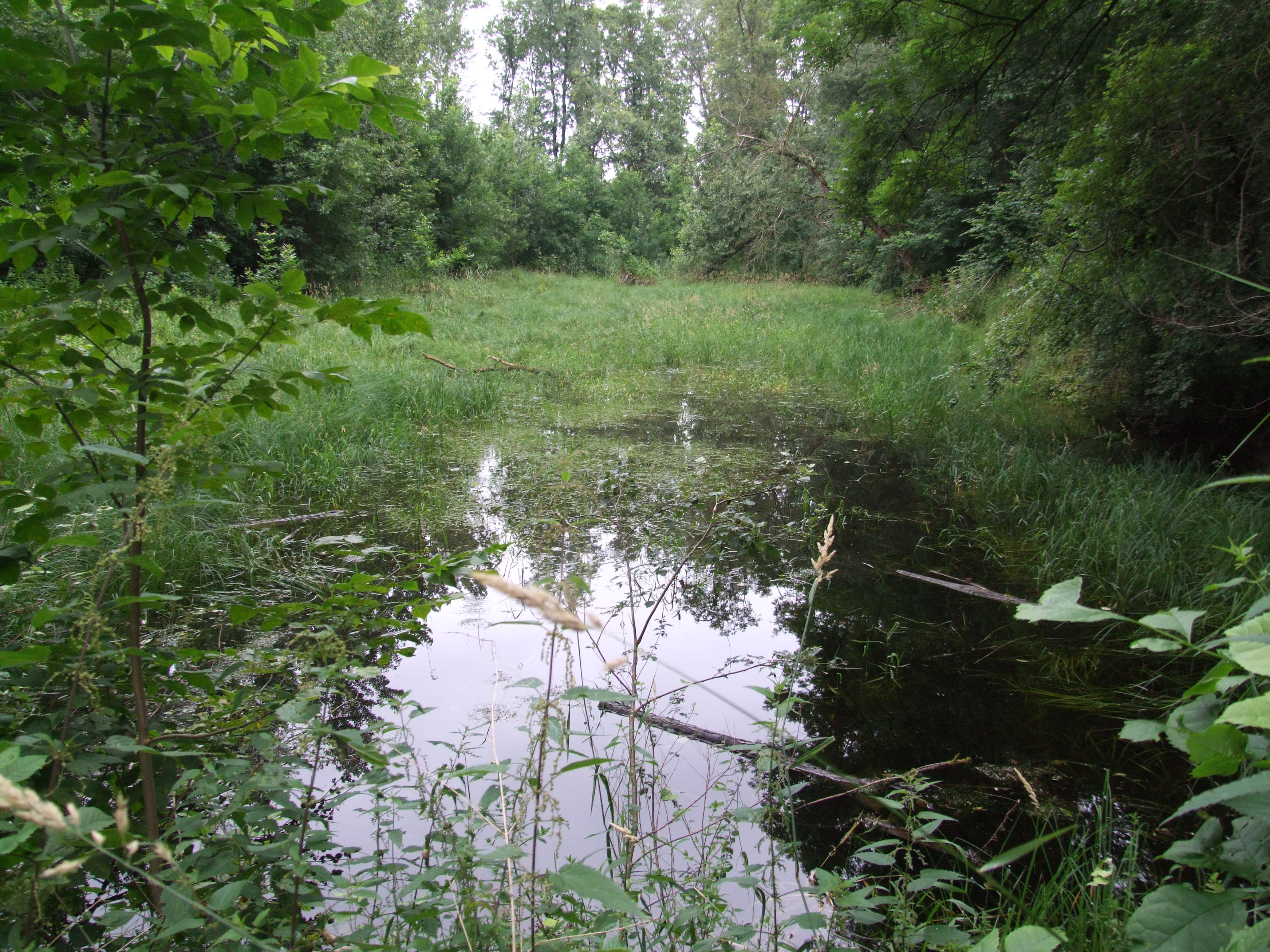 verlandende Schlute auf der Insel Horn, Speyerer Auwald